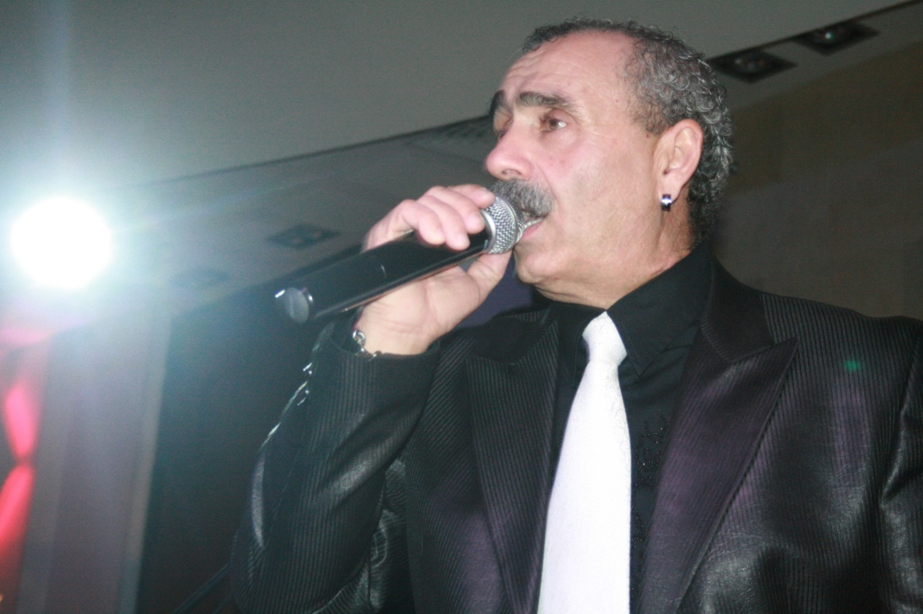 סמי לזמי, סולן להקת שפתיים